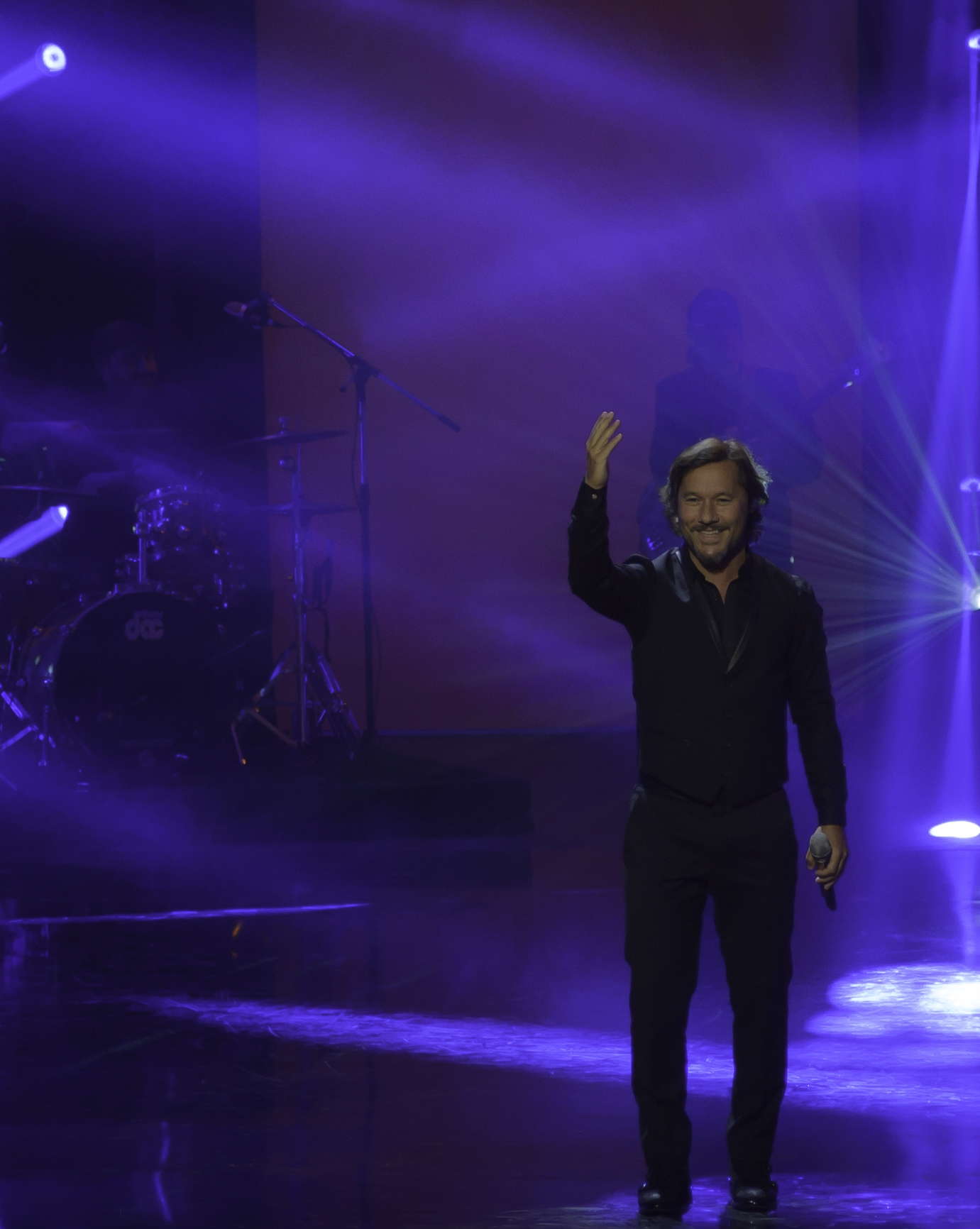 Convention Center, Punta del Este, Uruguay, 24 July 2016 5 5 ISO: 400